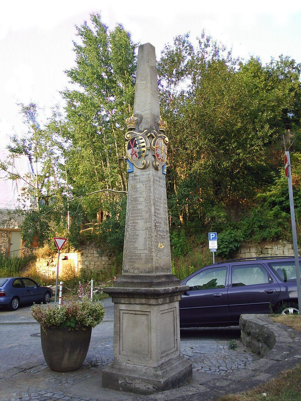 Saxon Milestone in Königstein, Saxony, Germany